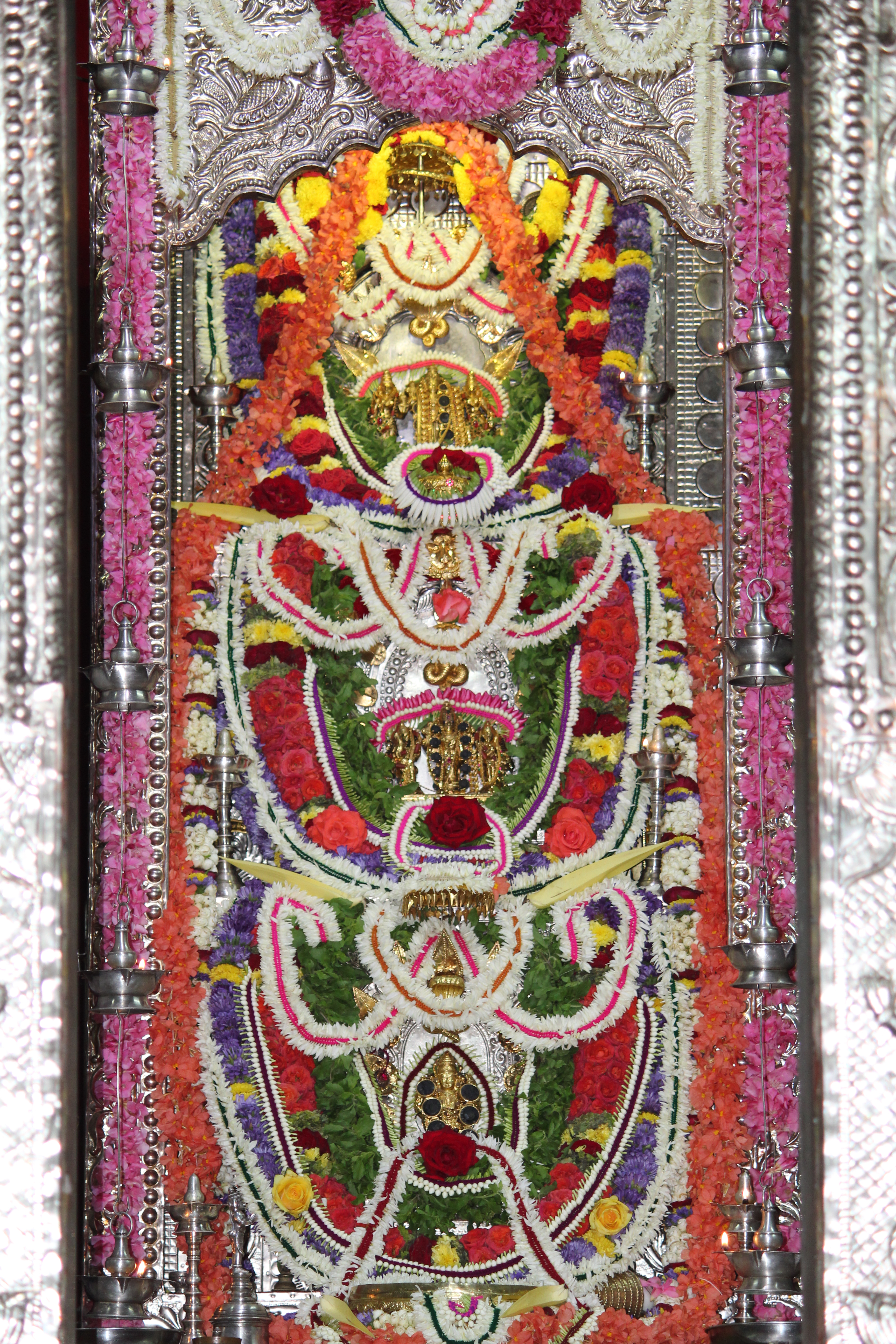 ಕನ್ನಡ: ಶ್ರೀ ಲಕ್ಷ್ಮೀ ವೆಂಕಟರಮಣ ದೇವರು